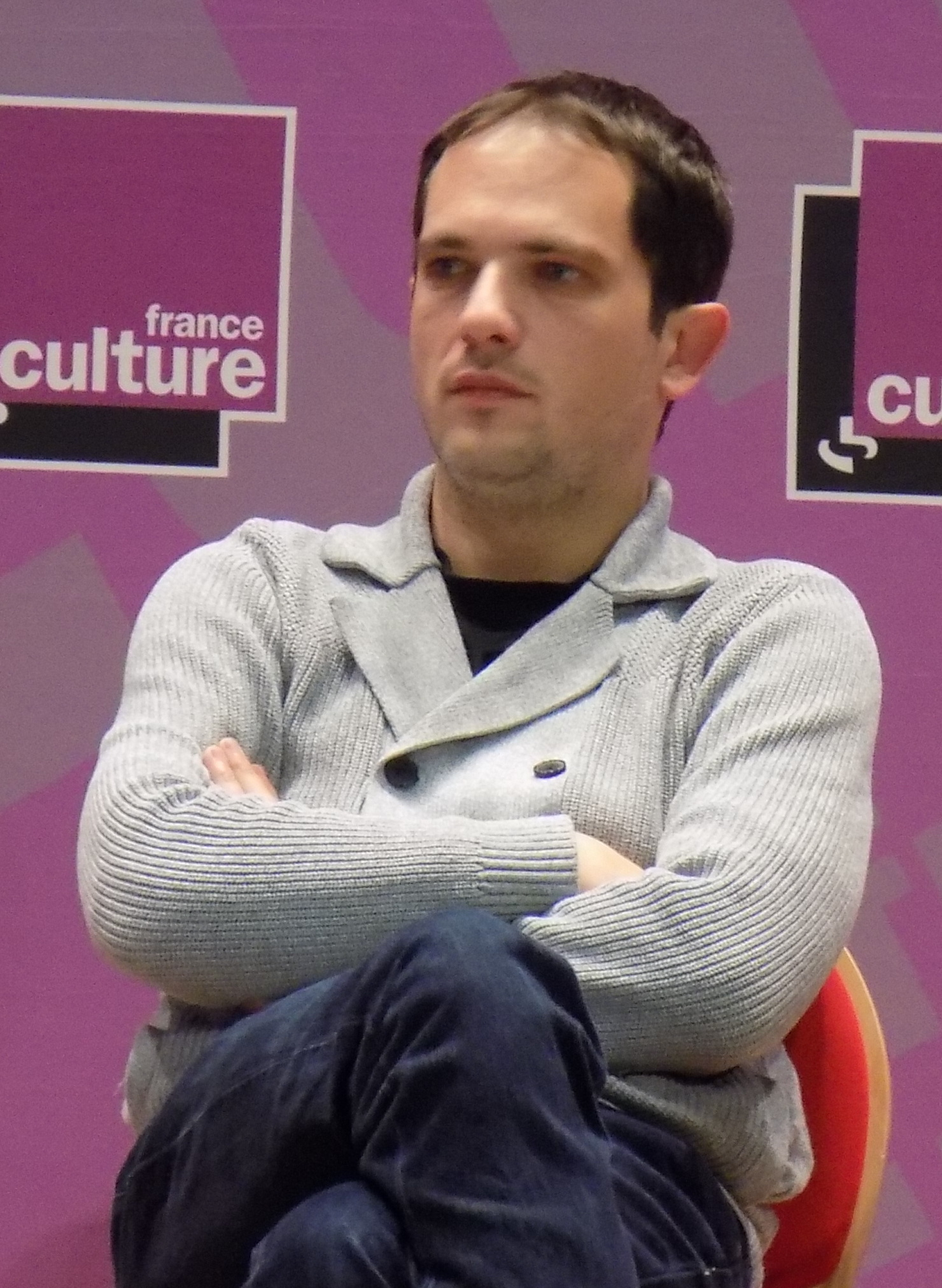 Michaël Foessel lors du forum « L’année vue par la philosophie » organisé par France Culture le 30 janvier 2016